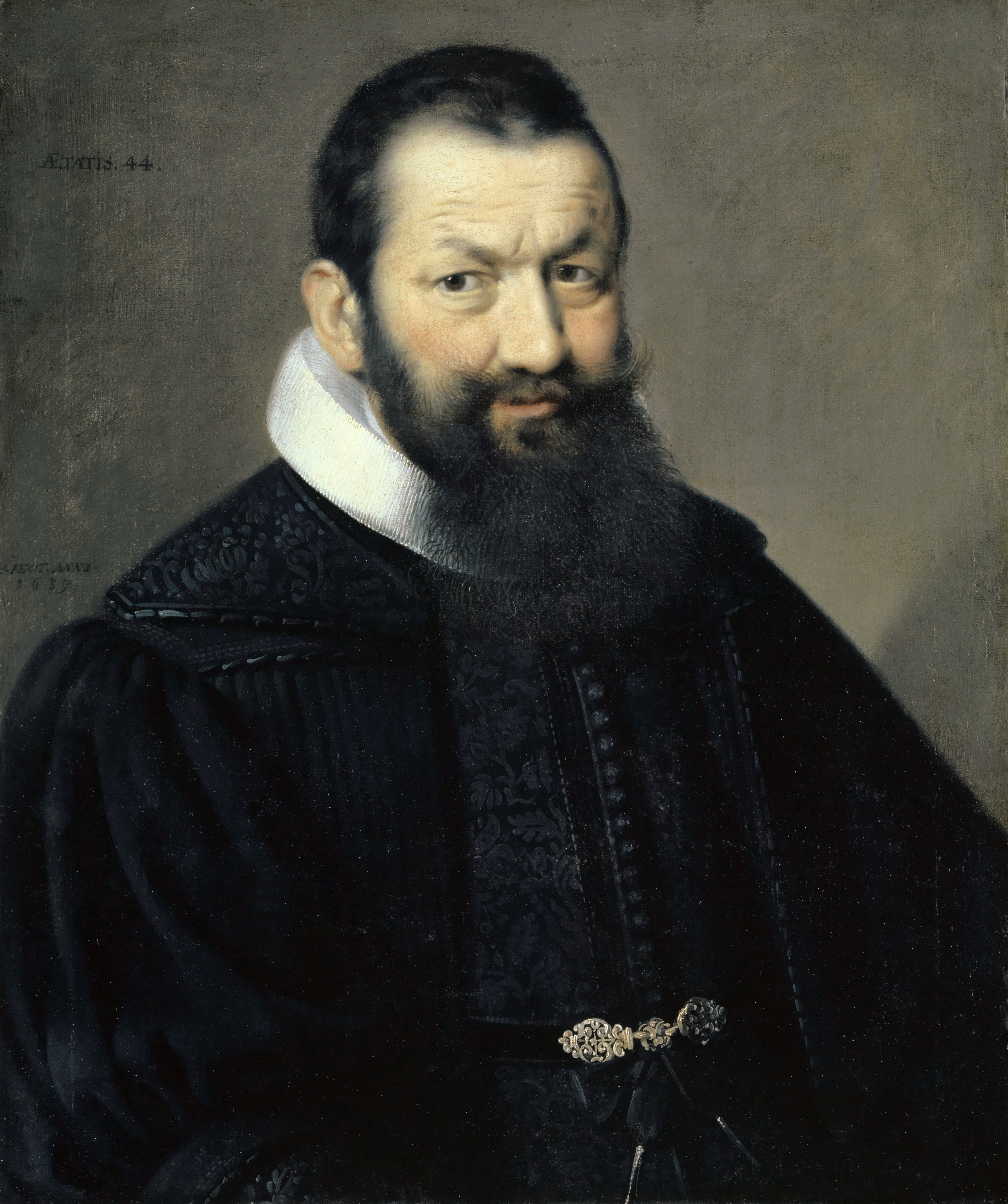 Samuel Hofmann: Bildnis des Johann Rudolf Wettstein, 1639. HxB: 67.5 x 56.5 cm; Öl auf Leinwand; Kunstmuseum Basel, Inv. 1926.